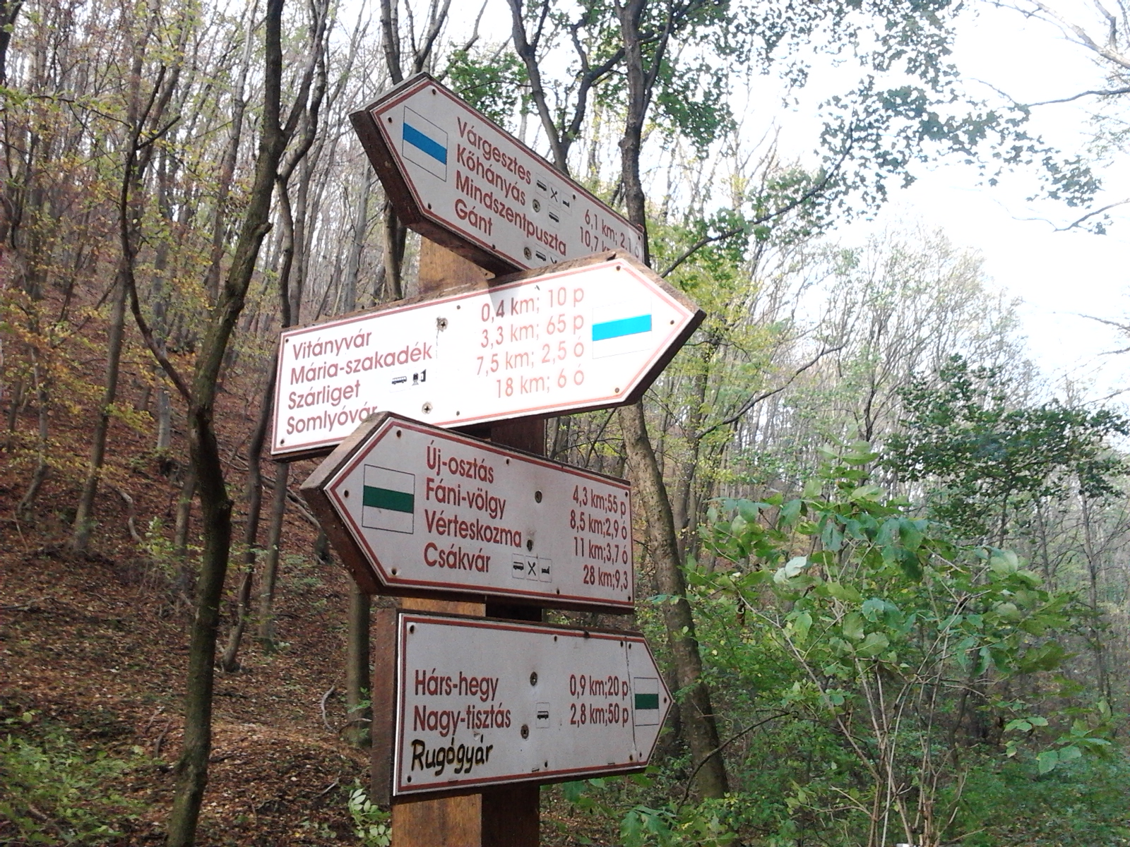 Turistajelzés a Vitányvár aljában, a vártól délnyugatra.